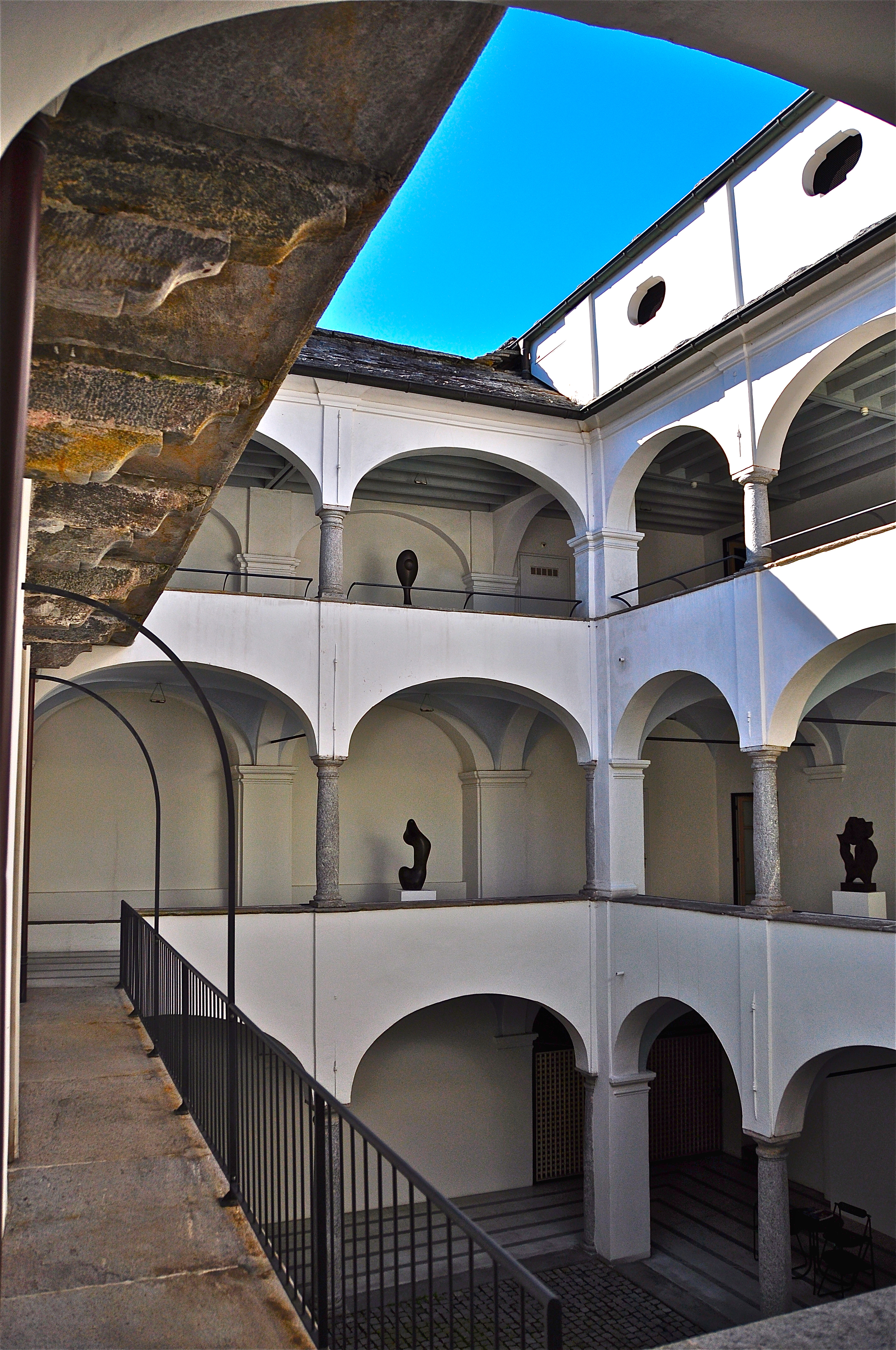 Tipica dimora signorile con la corte interna chiusa da tre livelli di portici.